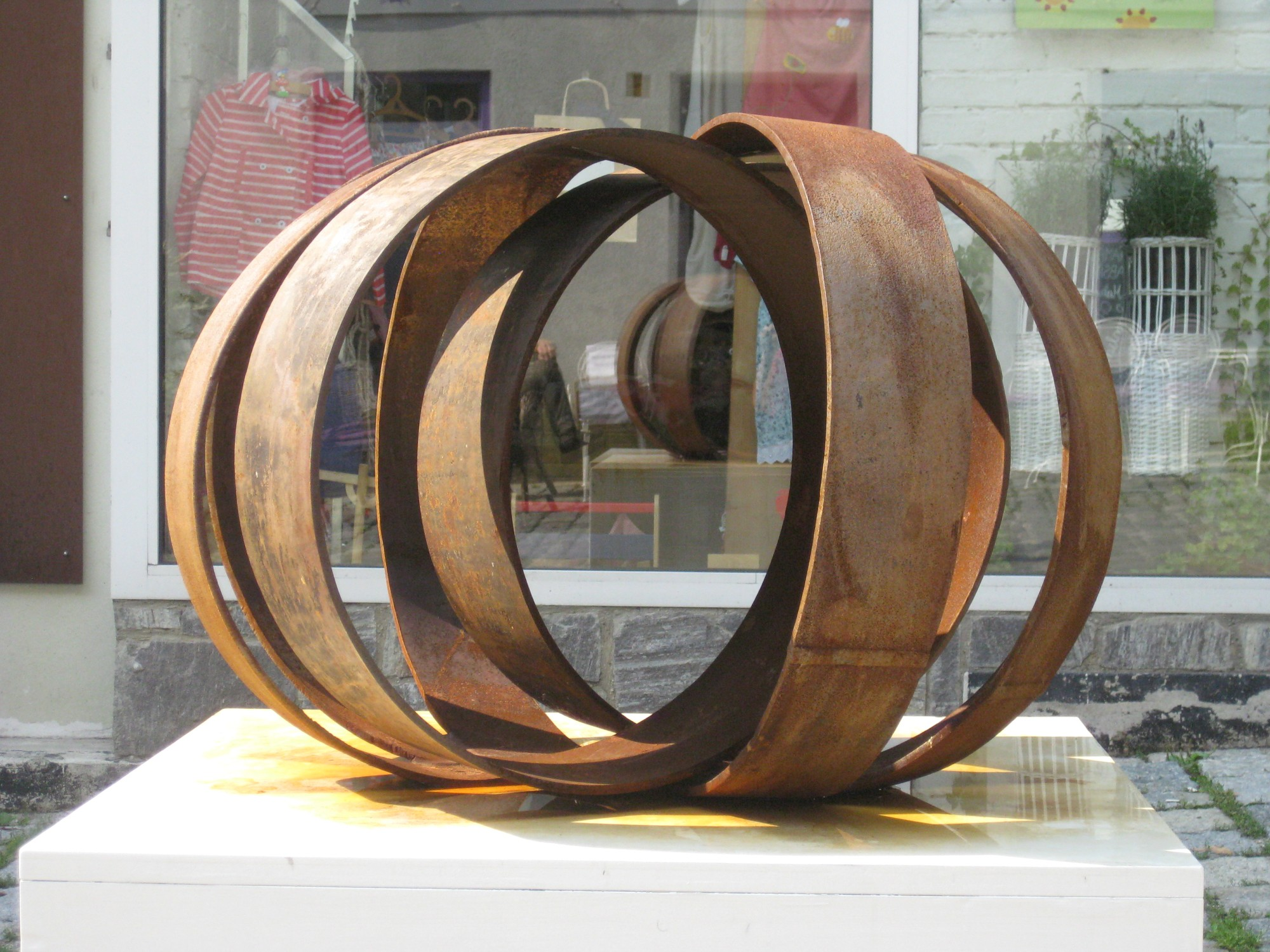 Eisenplastik Per aspera ad astra von Rolf Laven 2011, Barnabitengasse 3, Wien-Mariahilf.